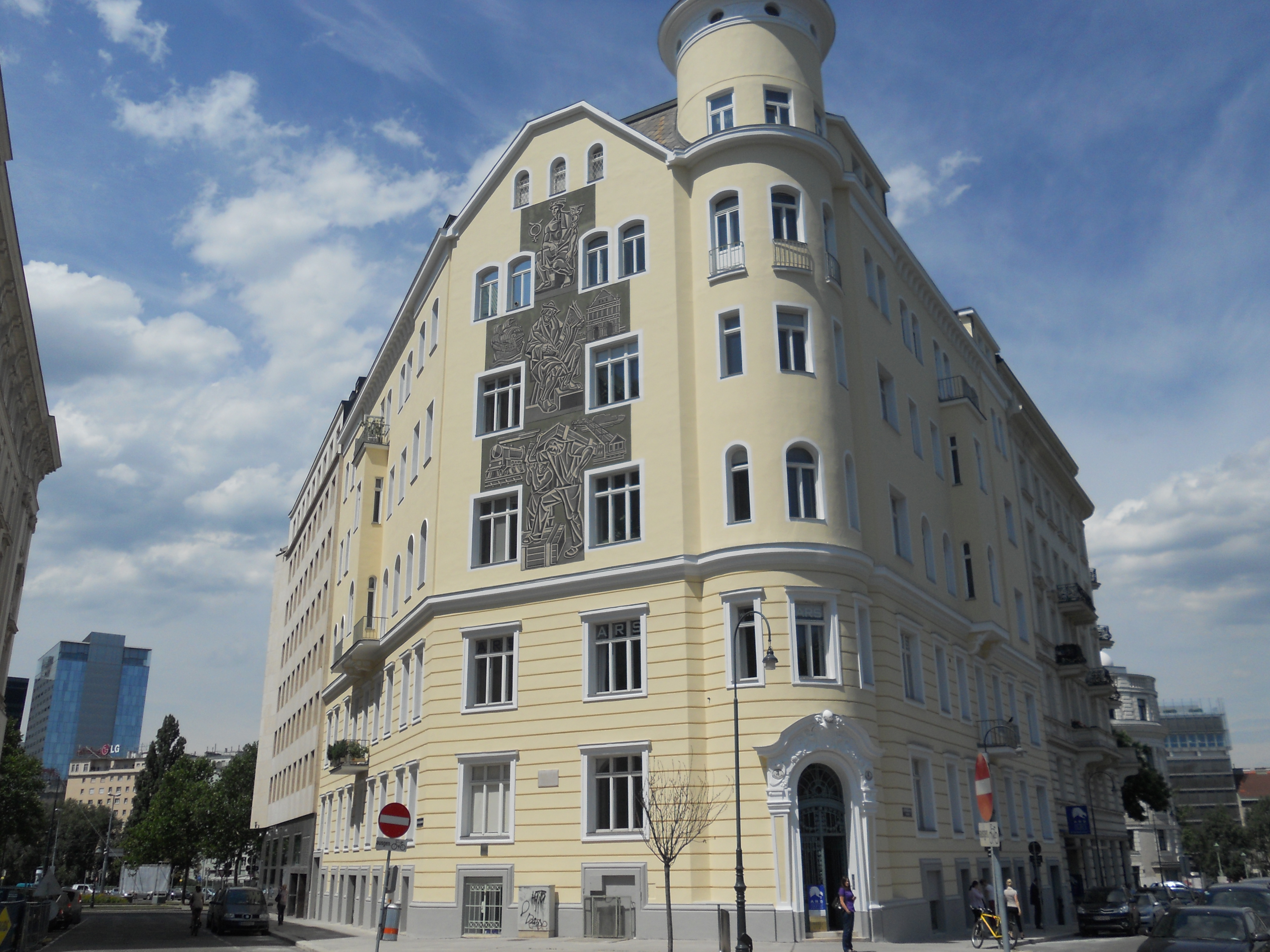 Miethaus, Ehem. Wohnung Löwenbach